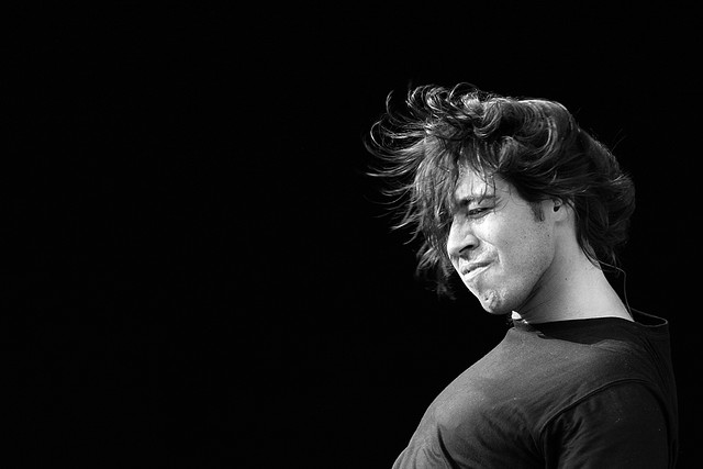 Blind Zero (poss. Miguel Guedes??), Festa do Avante